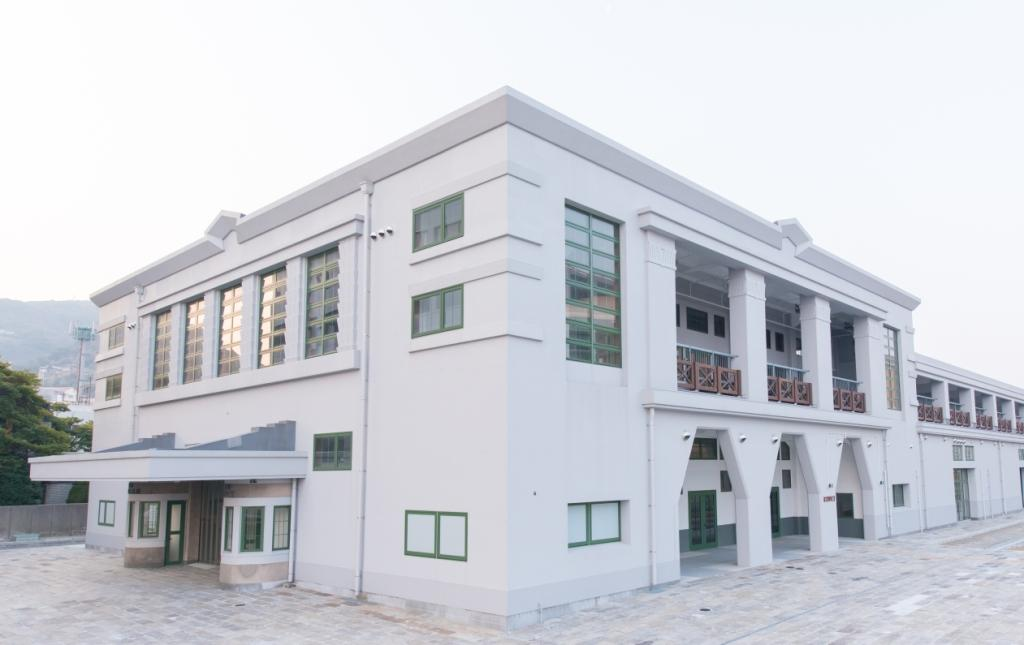 松永文庫が所在する旧大連航路上屋